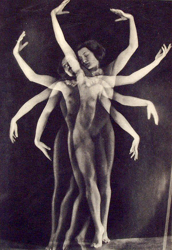 "Danse". Vintage photogravure. Printed 1933. 24 x 16,5 cm